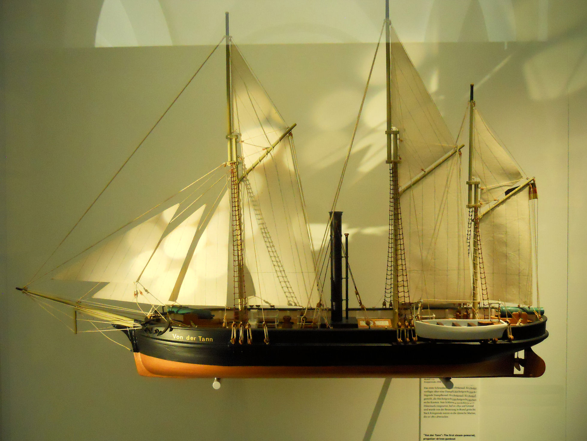 Modell des Schraubendampfers Von der Tann